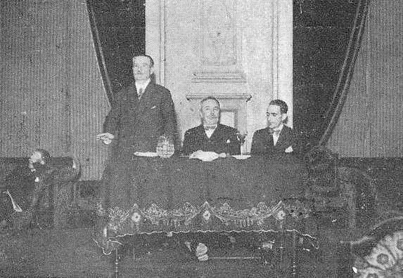 Manuel Casás Fernández, conferencia no Círculo Mercantil, fotografía en Vida Gallega 1931